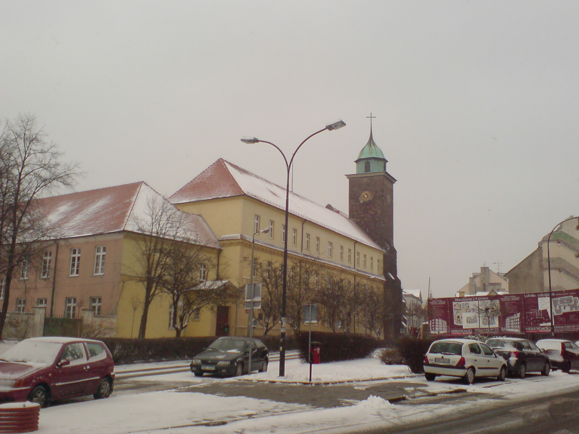 Zespół Szkół Ekonomicznych w Raciborzu (zimą).